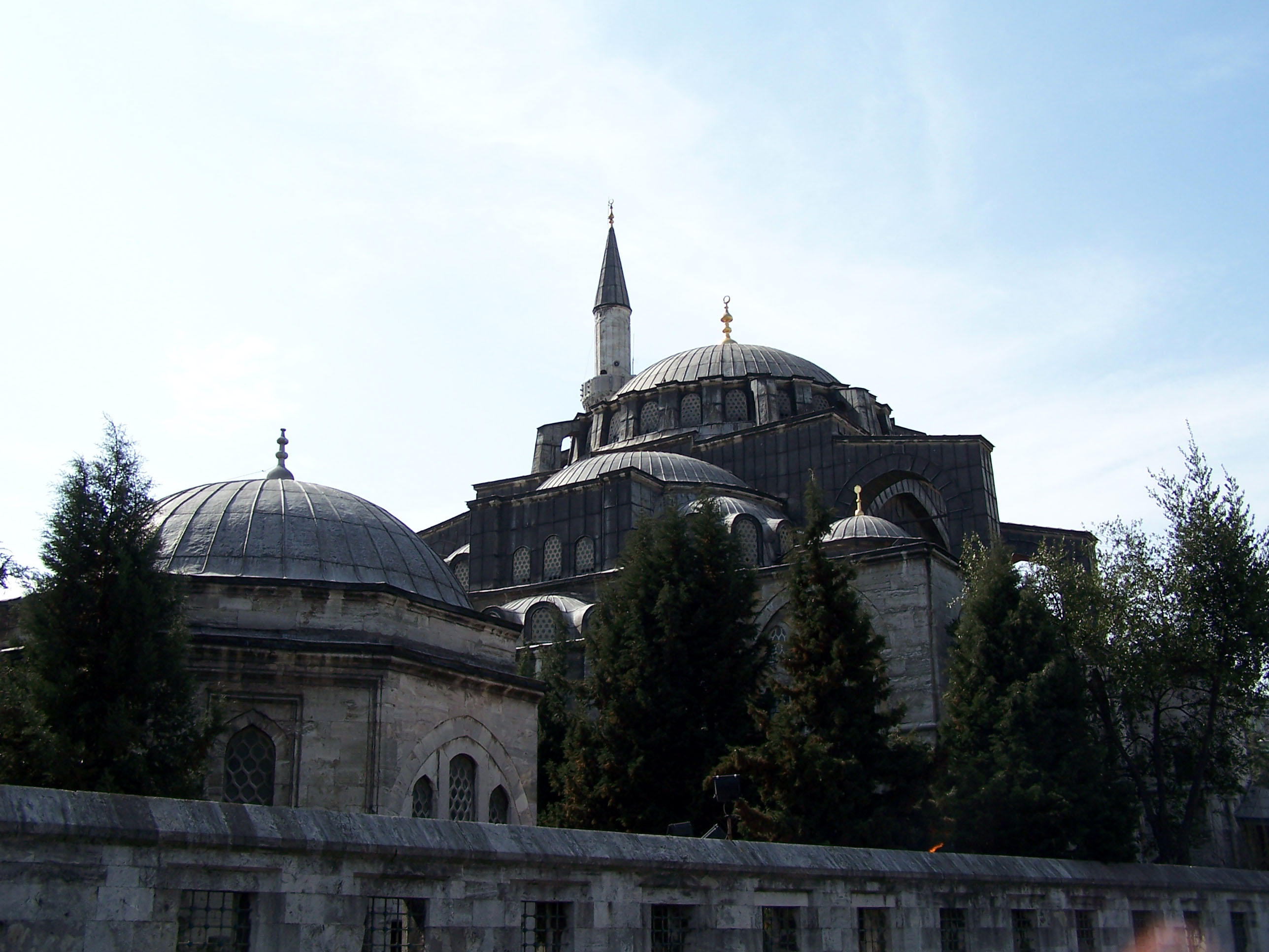 Kılıç Ali Paşa Camii in Tophane-Beyoğlu.